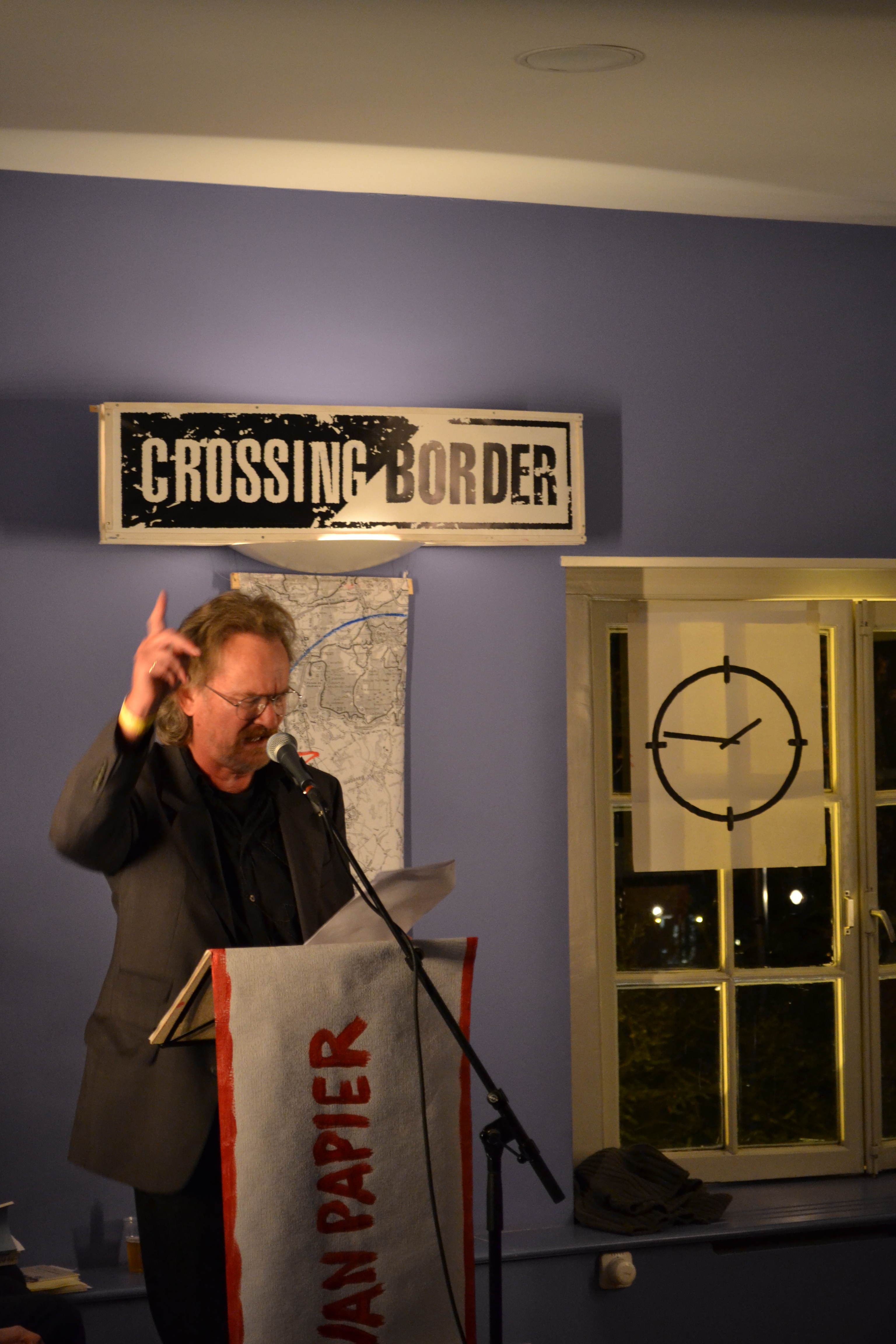 Jan J.B. Kuipers als lid van de Mannen van Papier tijdens Crossing Border, Den Haag 2011.